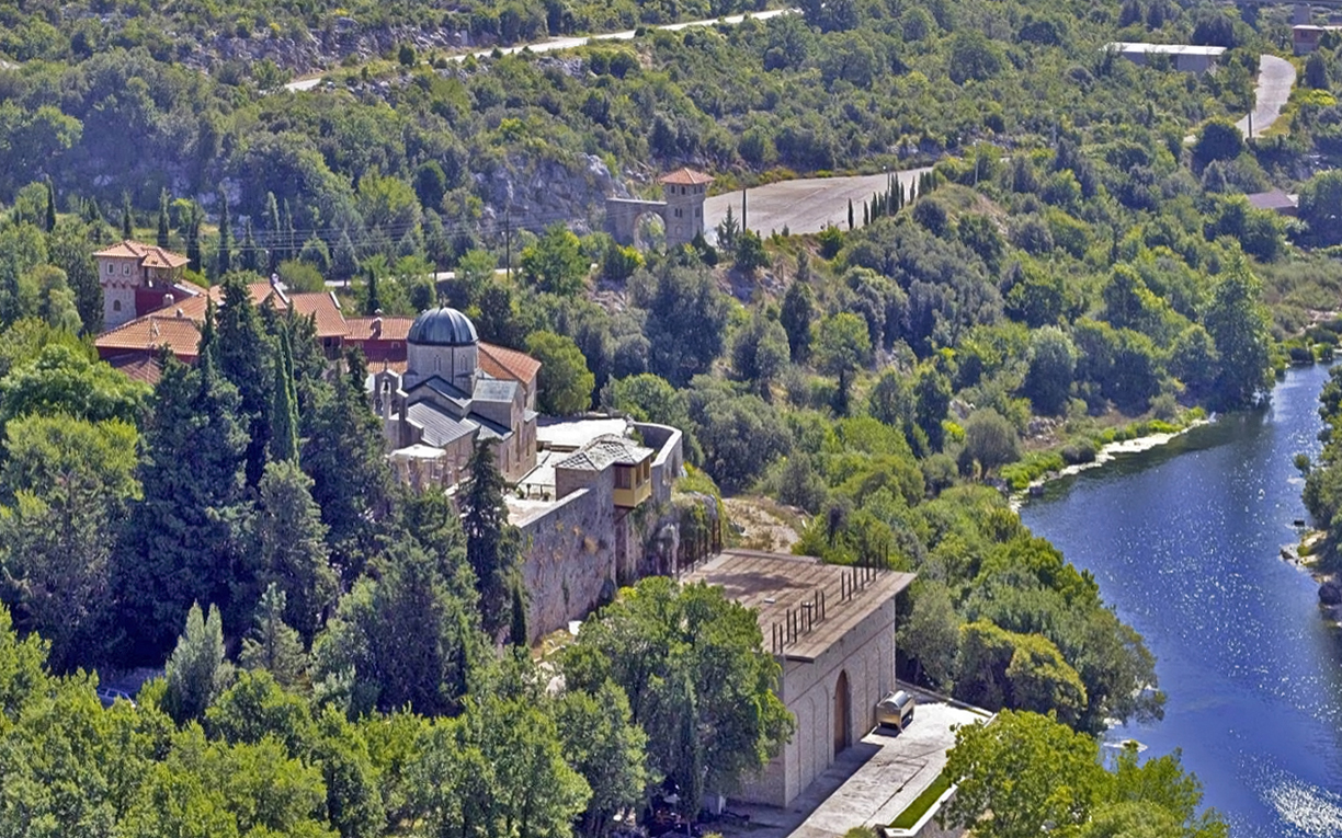 Монастырь Тврдаш у реки Требишнице в Герцеговине, в Сербской республике.